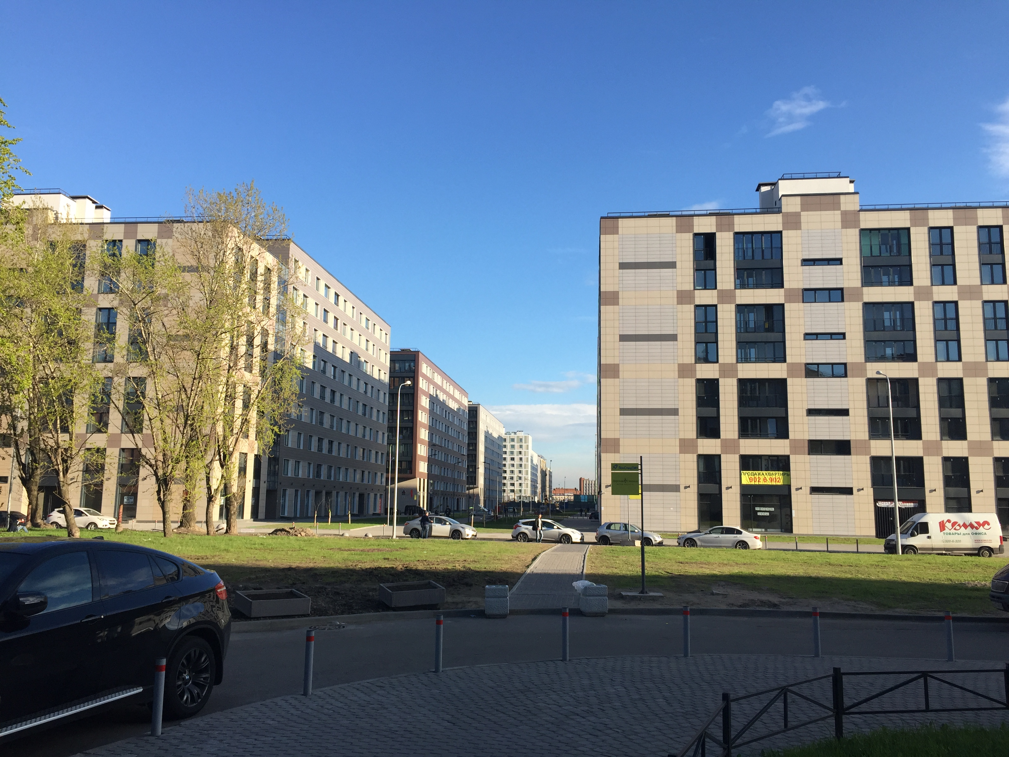 Кременчугская улица со стороны Товарного переулка, вид на квартал ЖК "Царская Столица", дом 9 корпус 1 (слева) и корпус 2 (справа). Далее видны дома 11, корпус 1, 13, корпус 1, 17 корпус 1 по улице Кременчугской.